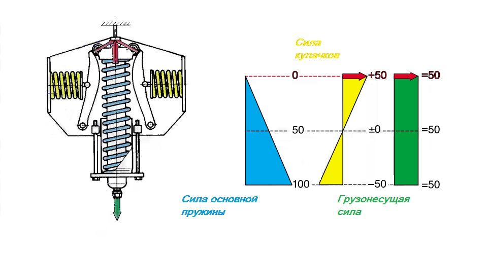 Конструктивное решение опоры постоянного усилия, основанное на использовании дополнительных пружин, действующих на грузонесущую часть через кулачки и рычаги с криволинейными поверхностями. Дополнительное воздействие приводит к выравниванию линейной характеристики основной пружины: грузонесущая сила в определенном диапазоне перемещений грузонесущей части становится постоянной.